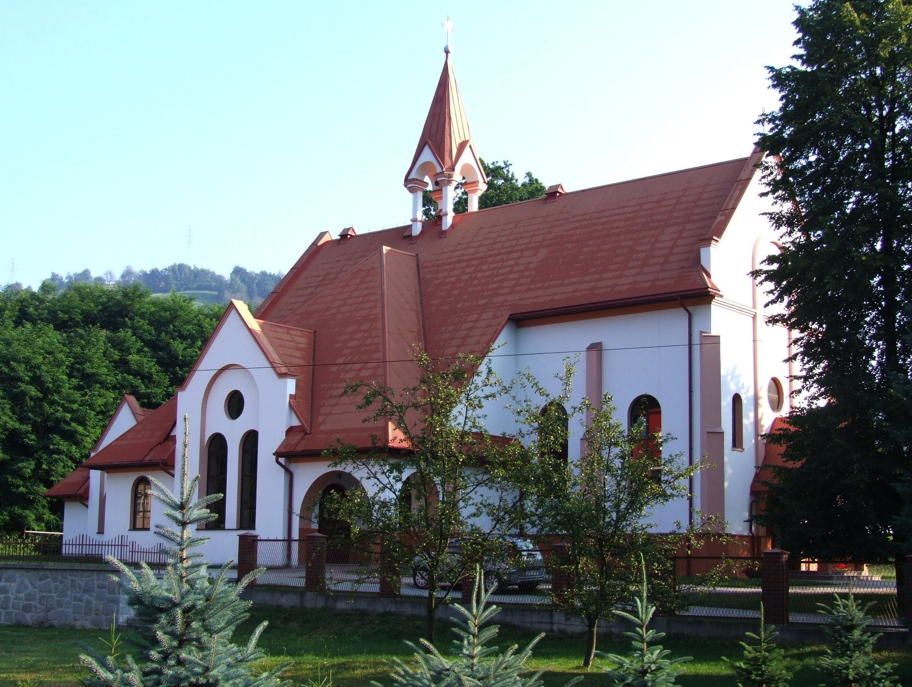 Kościół w Łomnicy-Zdrój